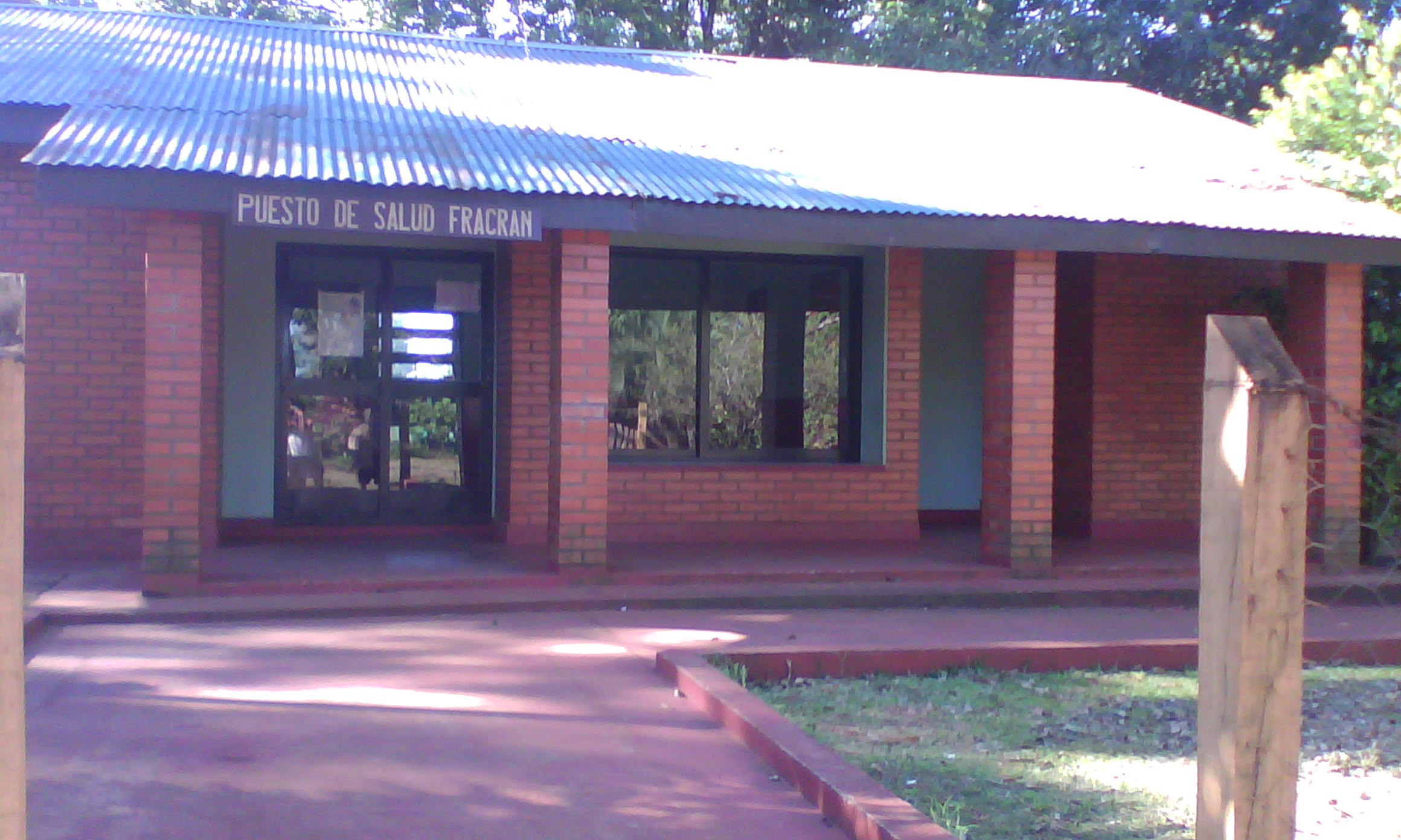 Puesto de salúd. Fracrán, Prov. de Misiones.